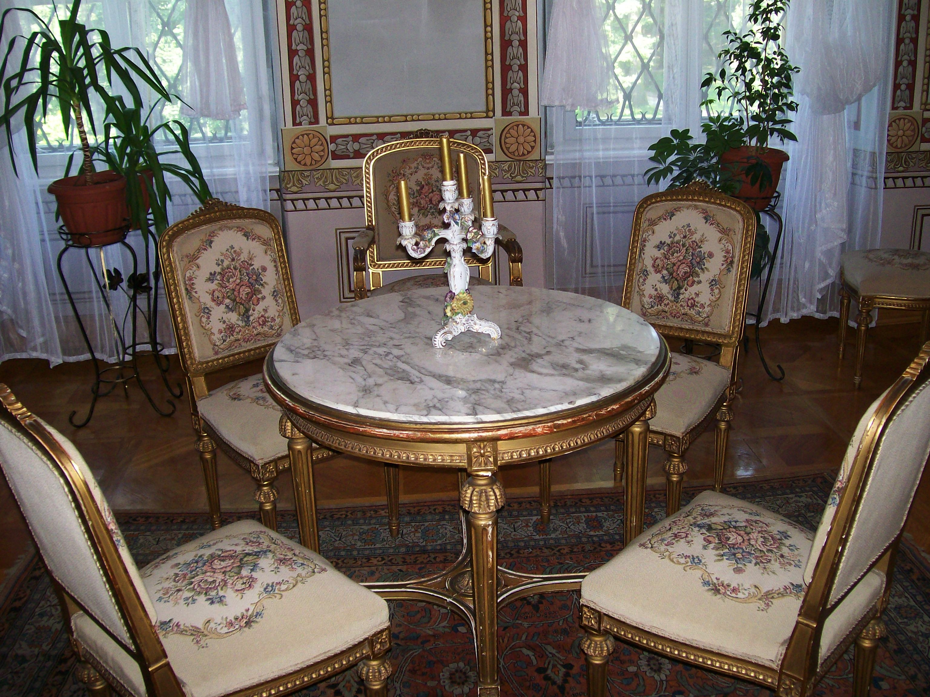 Muzeum Zagłębia w Będzinie - Wystawa:"Wnętrza stylowe XVIII - XIX w."